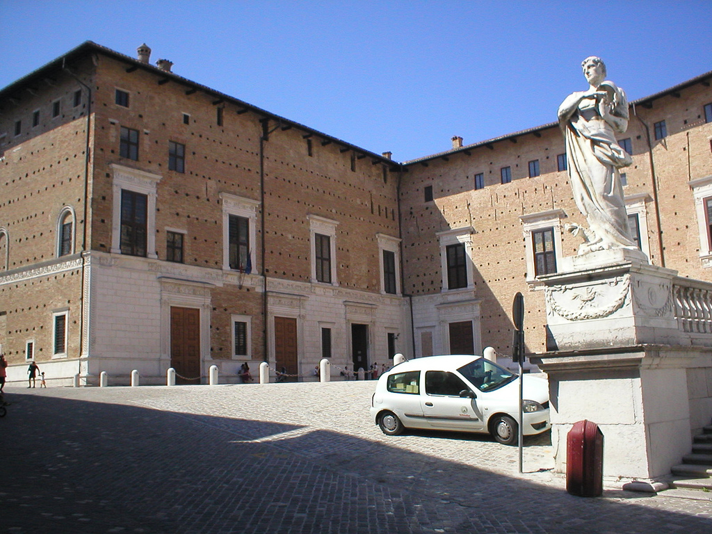 Statue (Duke Federico) — Palazzo Ducale (Urbino).